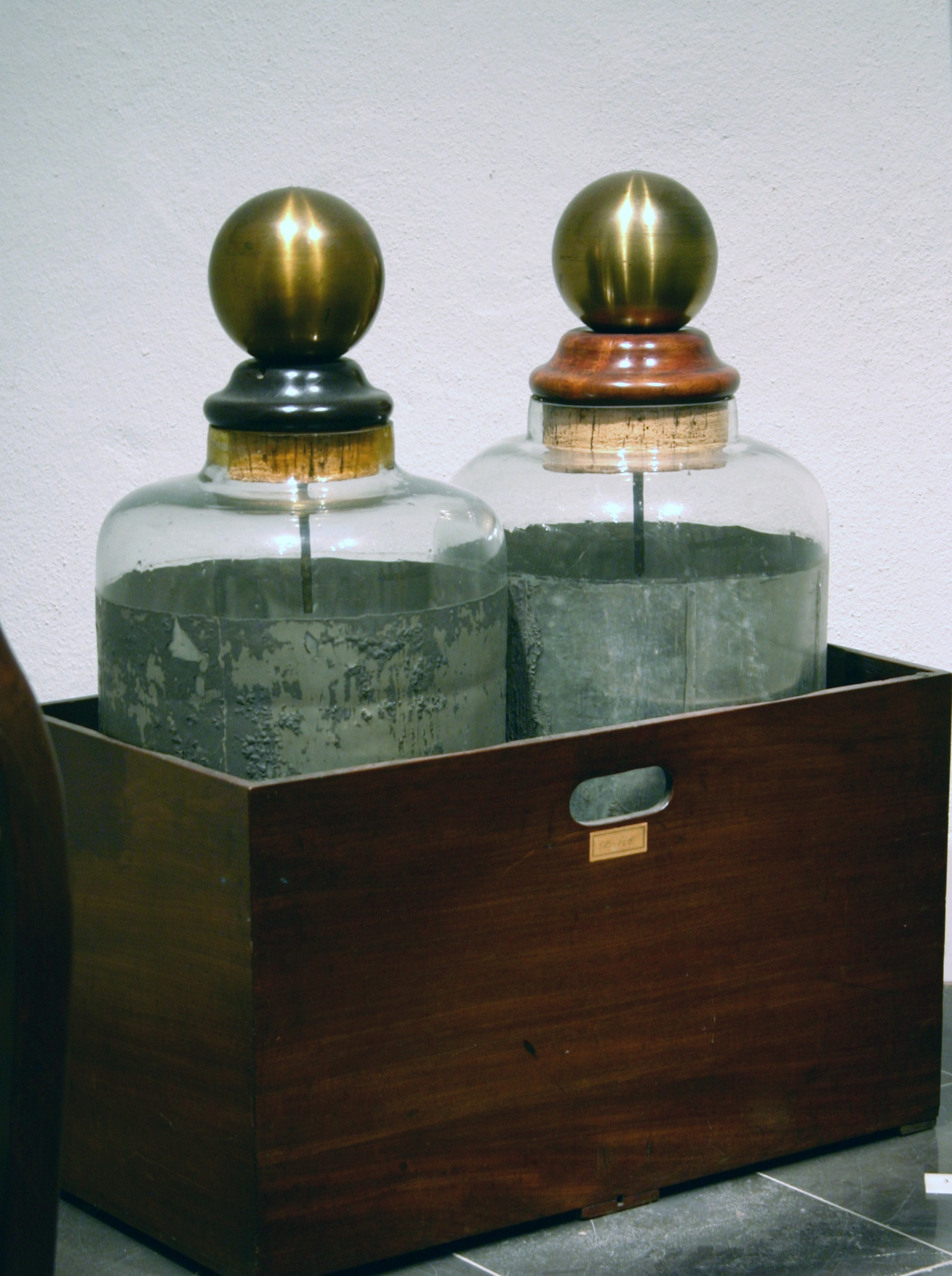 Museum Boerhaave, Leiden - Leiden Jars